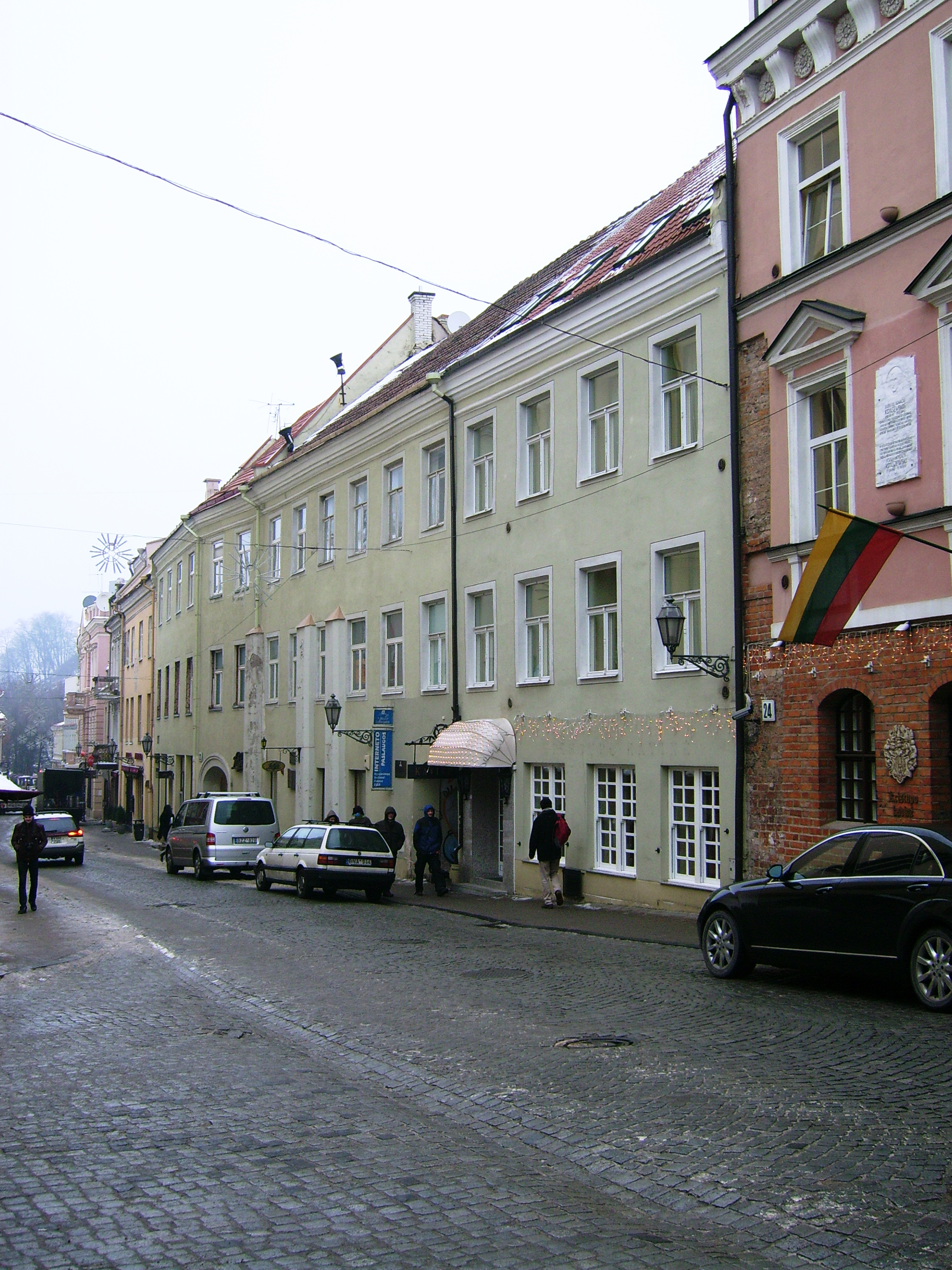 Vilniaus universiteto Medicinos fakultetas